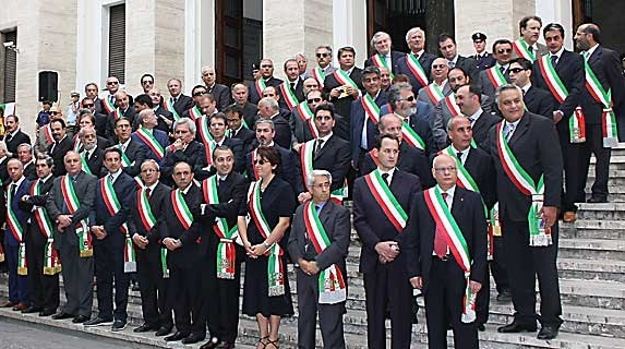 Sindaci della provincia di Cosenza